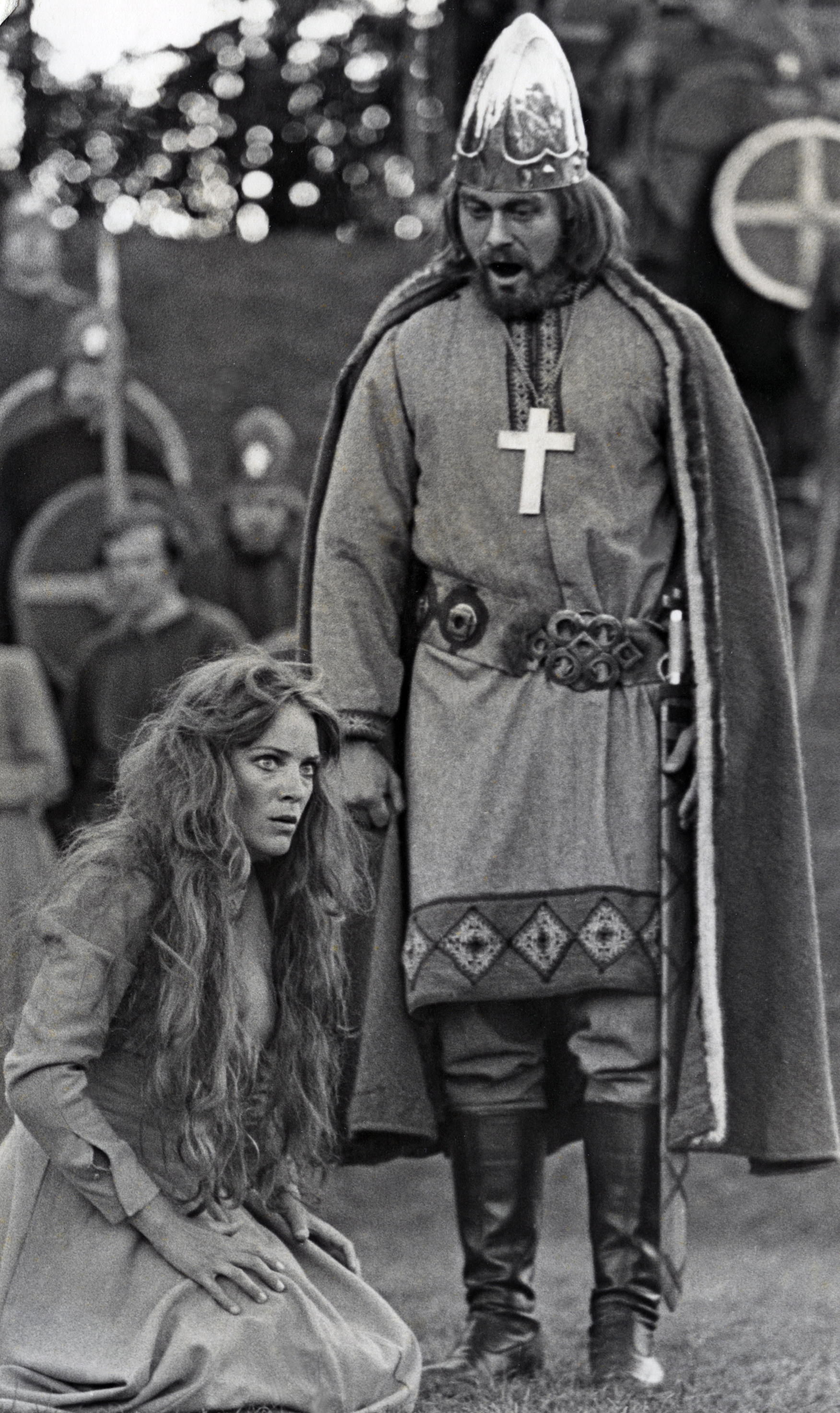 Norwegian actor Nils Ole Oftebro as king Olaf II of Norway and Bentine Holm as Gudrun in the The Saint Olav Drama at Stiklestad 1975.